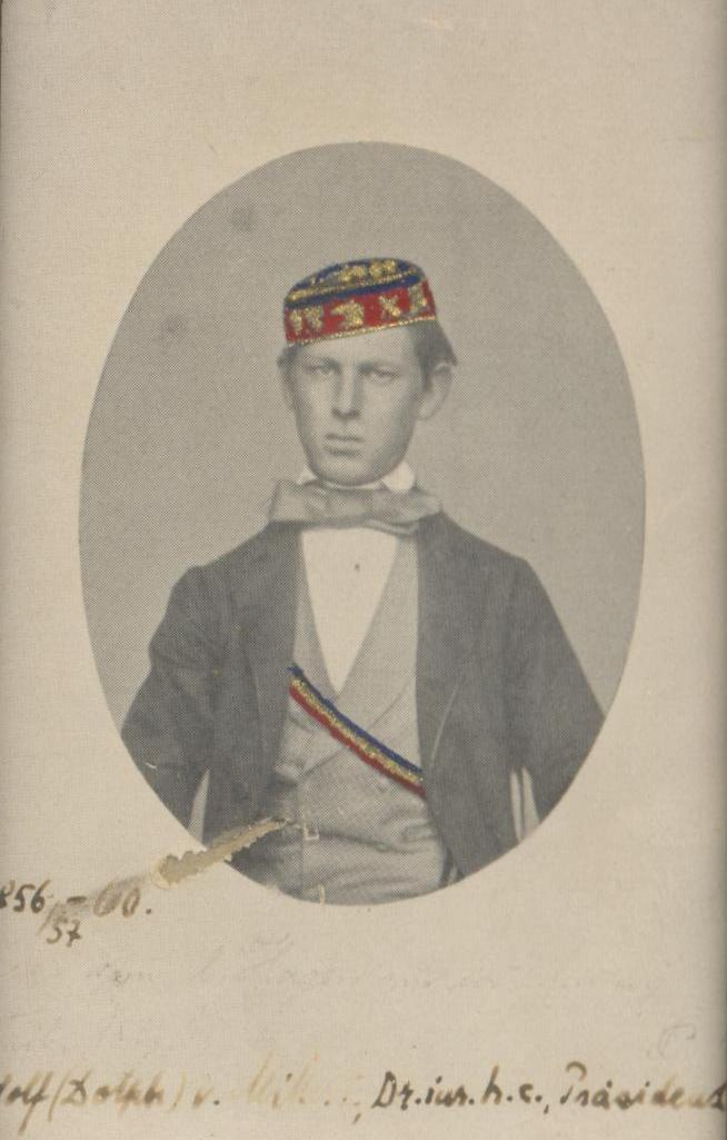 Porträtaufnahme von Gustav Adolf von Miller als Student in Tübingen